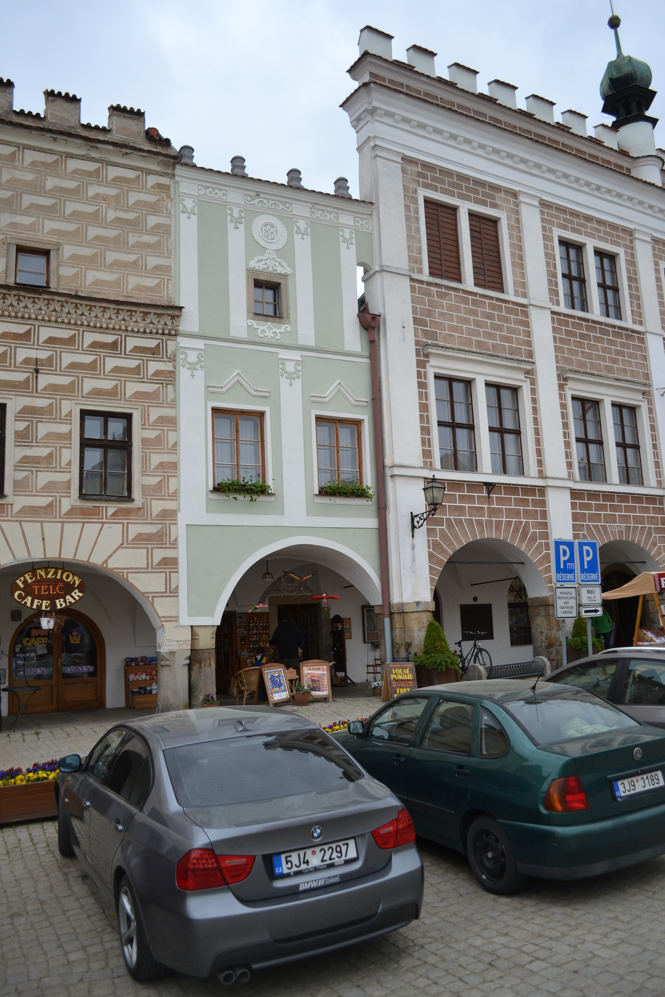 Dům U Šeniglů (na obrázku uprostřed), náměstí Zachariáše z Hradce 11, Telč. Stav k 20.05.2017.